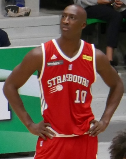 Pape Sy avec la SIG, octobre 2017